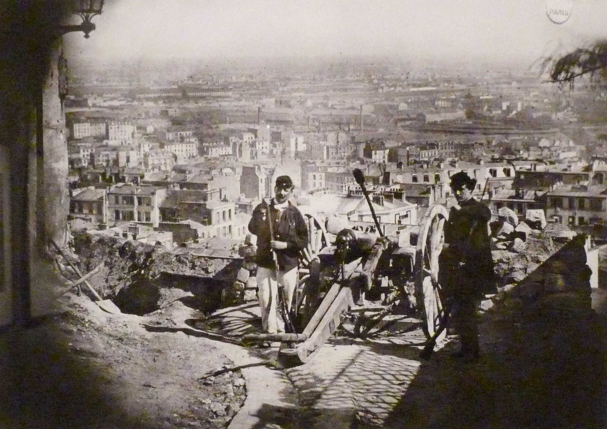 Exposition La Commune de Paris à l'Hôtel de Ville de Paris (18 mars - 28 mai 2011) - Barricade sur la Butte Montmartre, rue de la Bonne - Bibliothèque historique de la Ville de Paris.